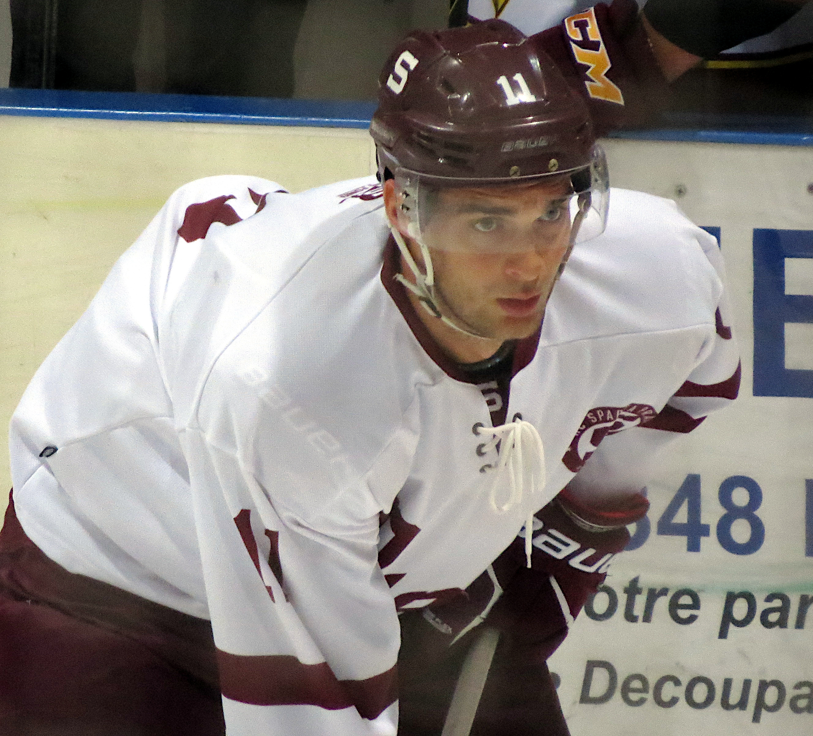 GSHC - Sparta Prague 11 : Vladimír Eminger